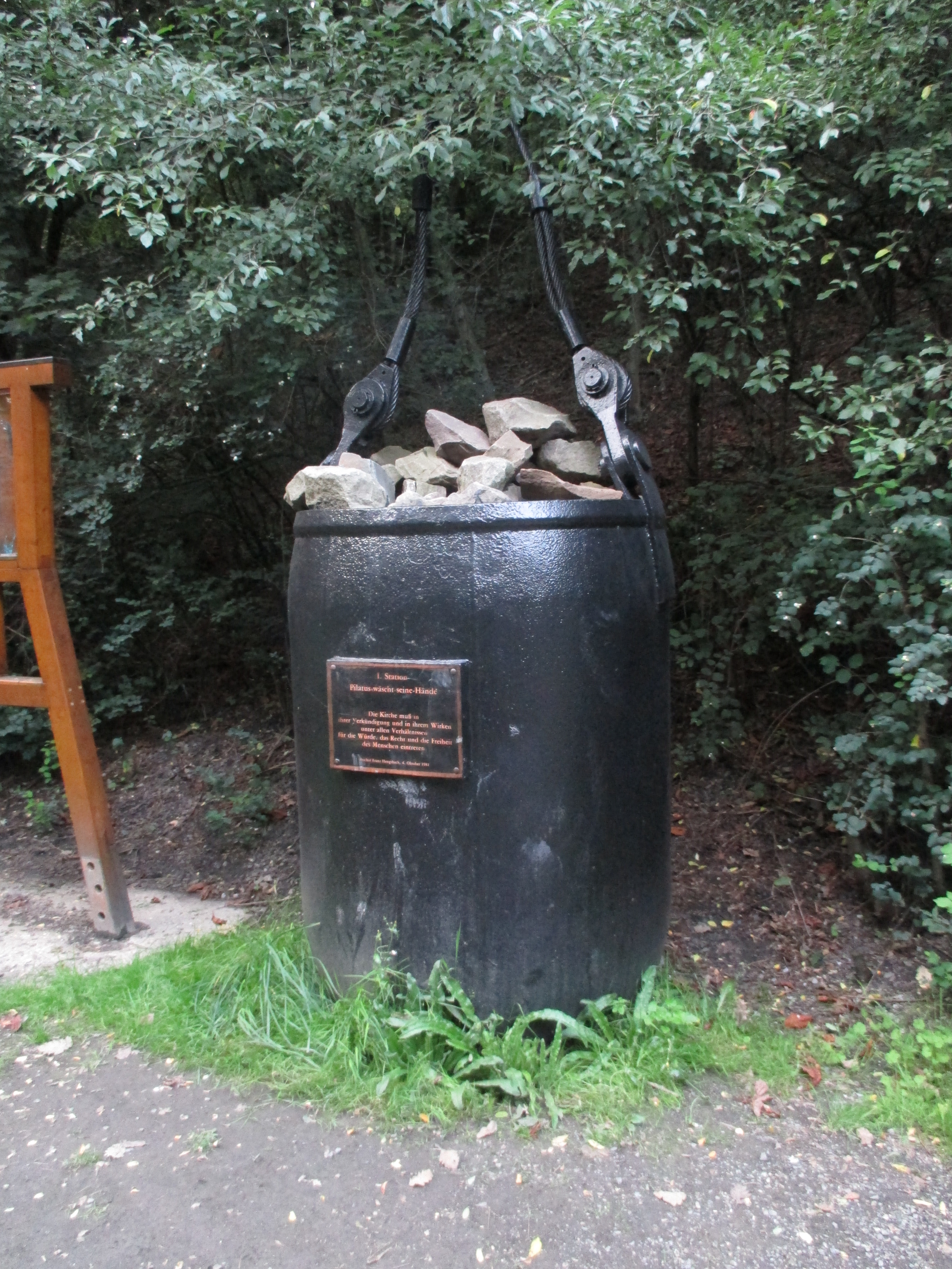 Station 1 des Bergbaukreuzweges an der Halde Haniel in Bottrop.